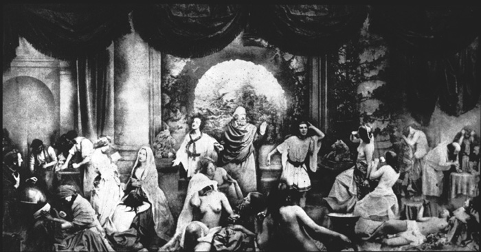 Composición a partir de 32 negativos diferentes